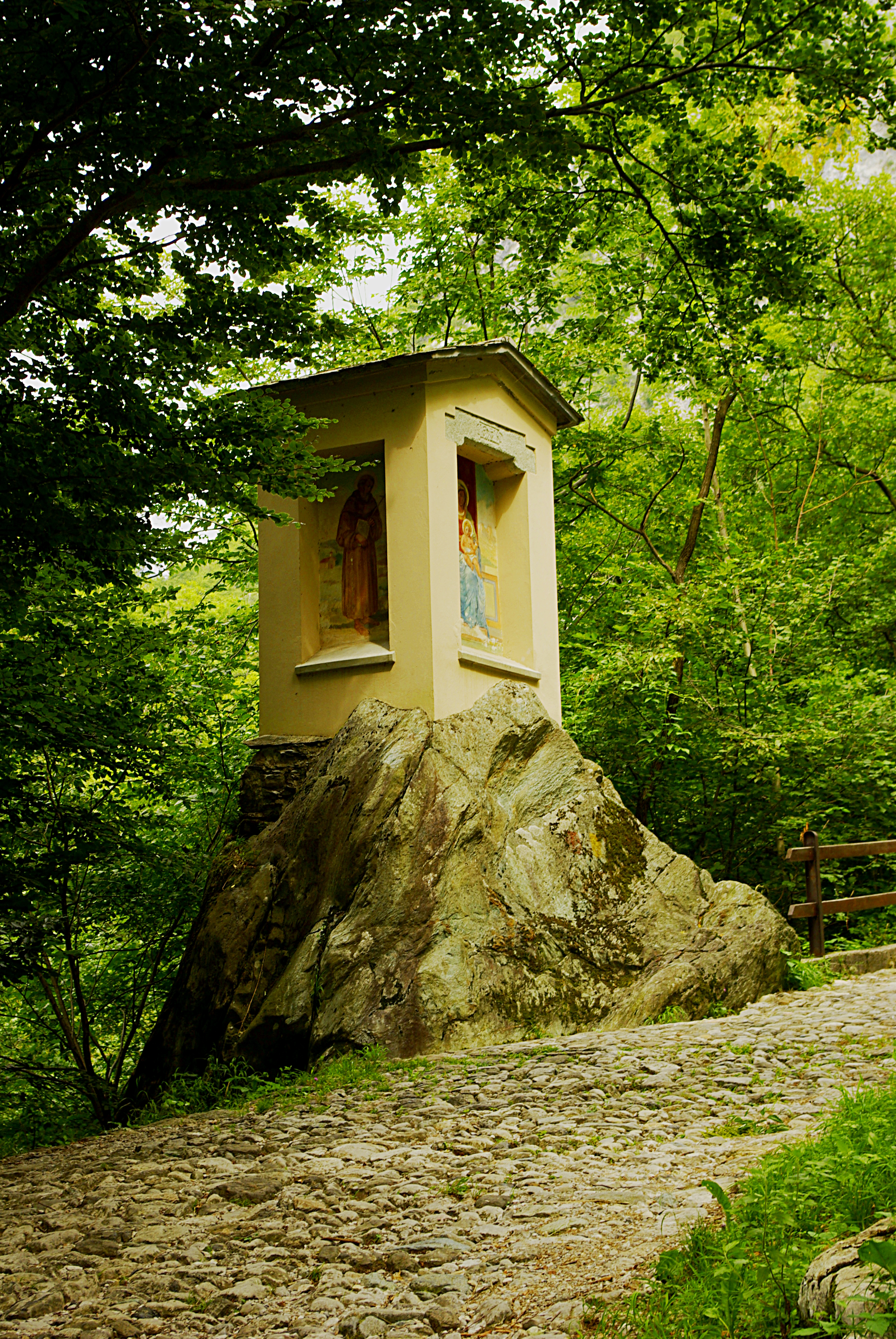 cappella San Miro su trovante Canzo Como Lombardia Italy